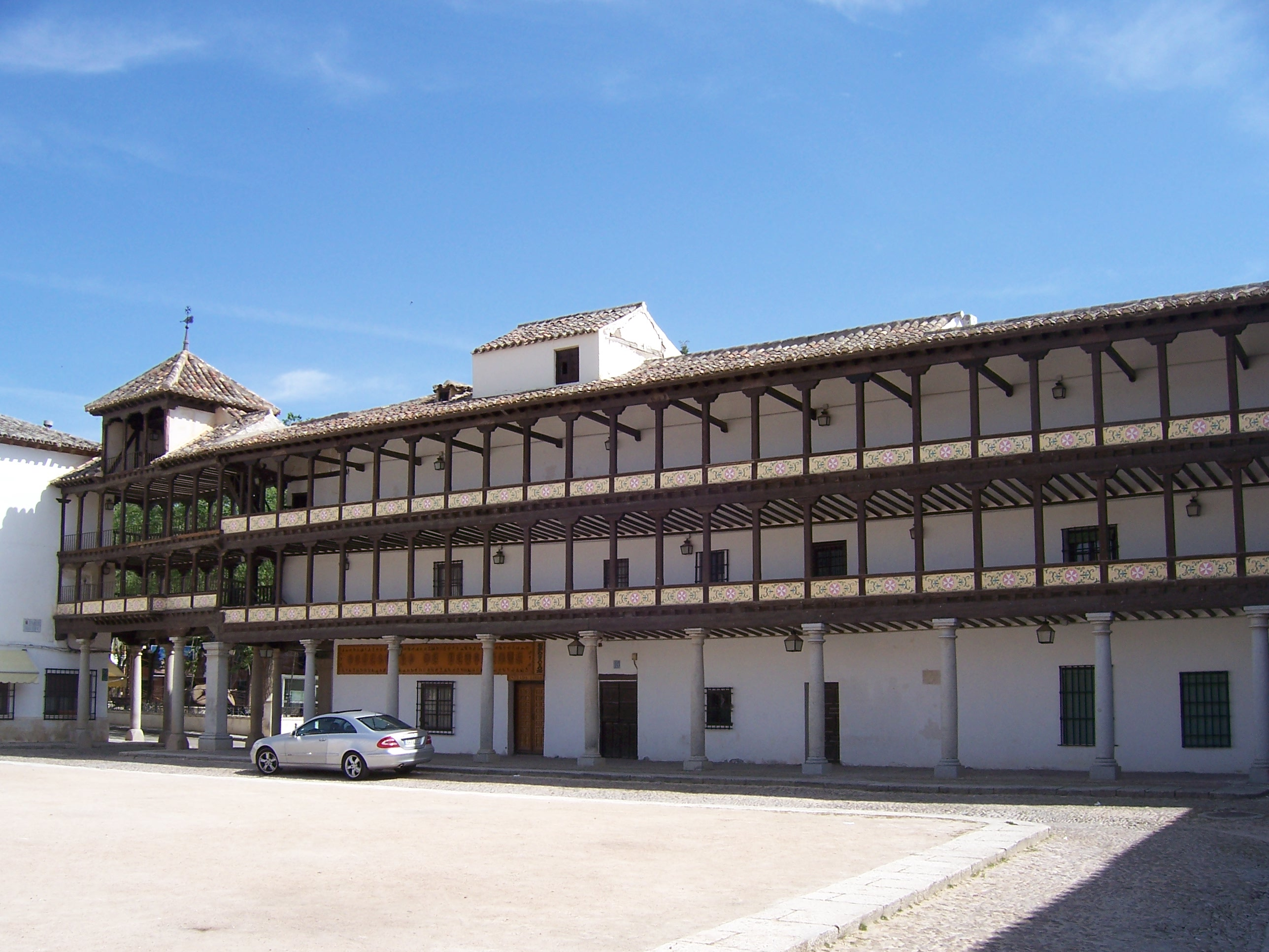 Vista Plaza Mayor de Tembleque